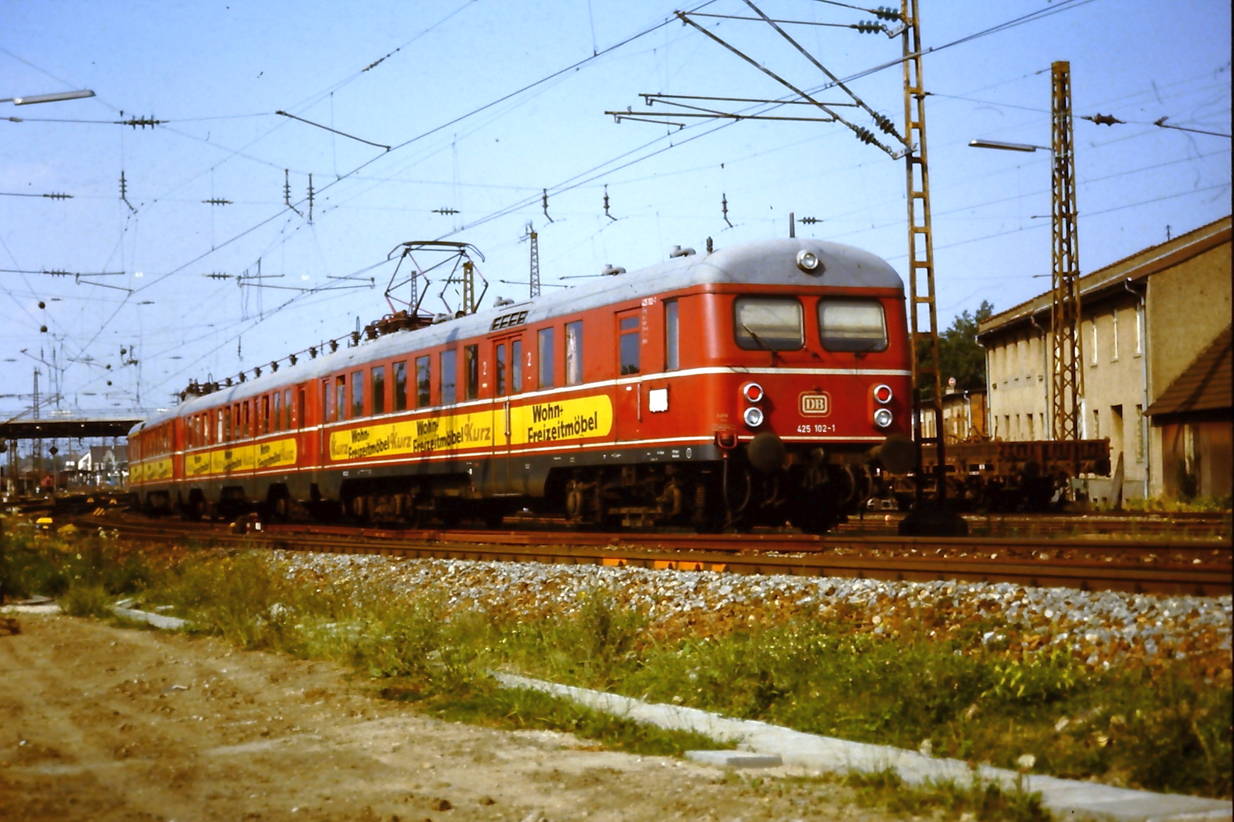 Der Triebzug 425.02 durchfuhr am 24.7.1984 den Bahnhof Mühlacker. Eingescannt vom eigenen Dia, Archiv Nr 64/24.